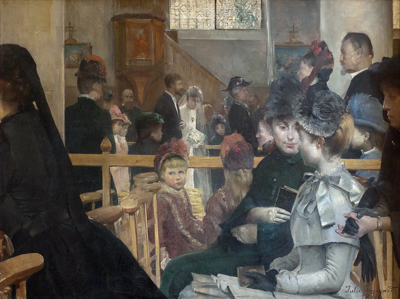 Le mariage